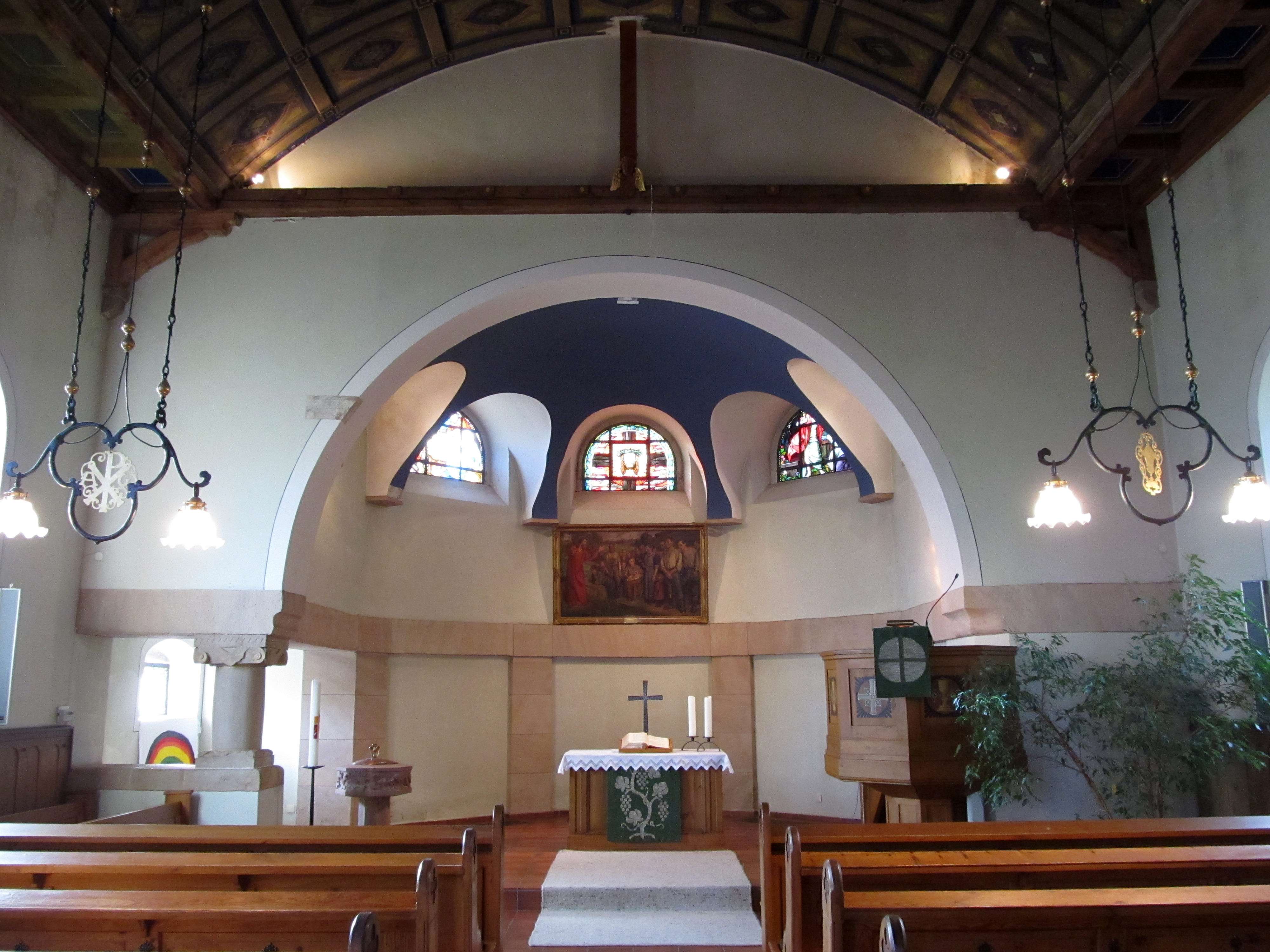 Blick ins Innere der Protestantischen Kirche Höchen, einem Stadtteil von Bexbach, Saarland